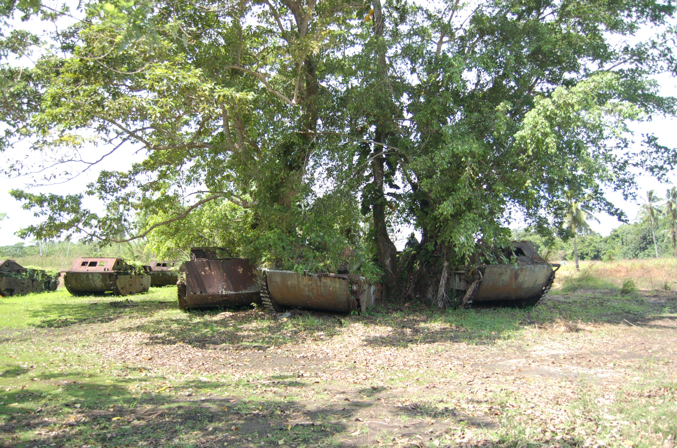 Landungsfahrzeuge auf den Salomonen